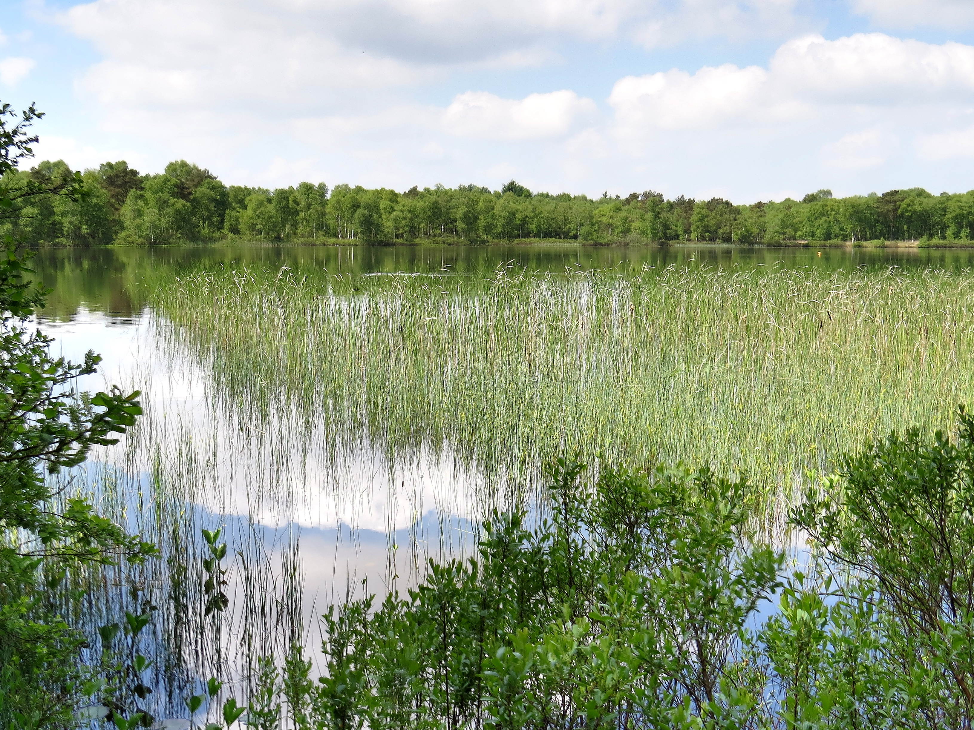 Südostufer des Silbersees, NSG Silbersee und Laaschmoor